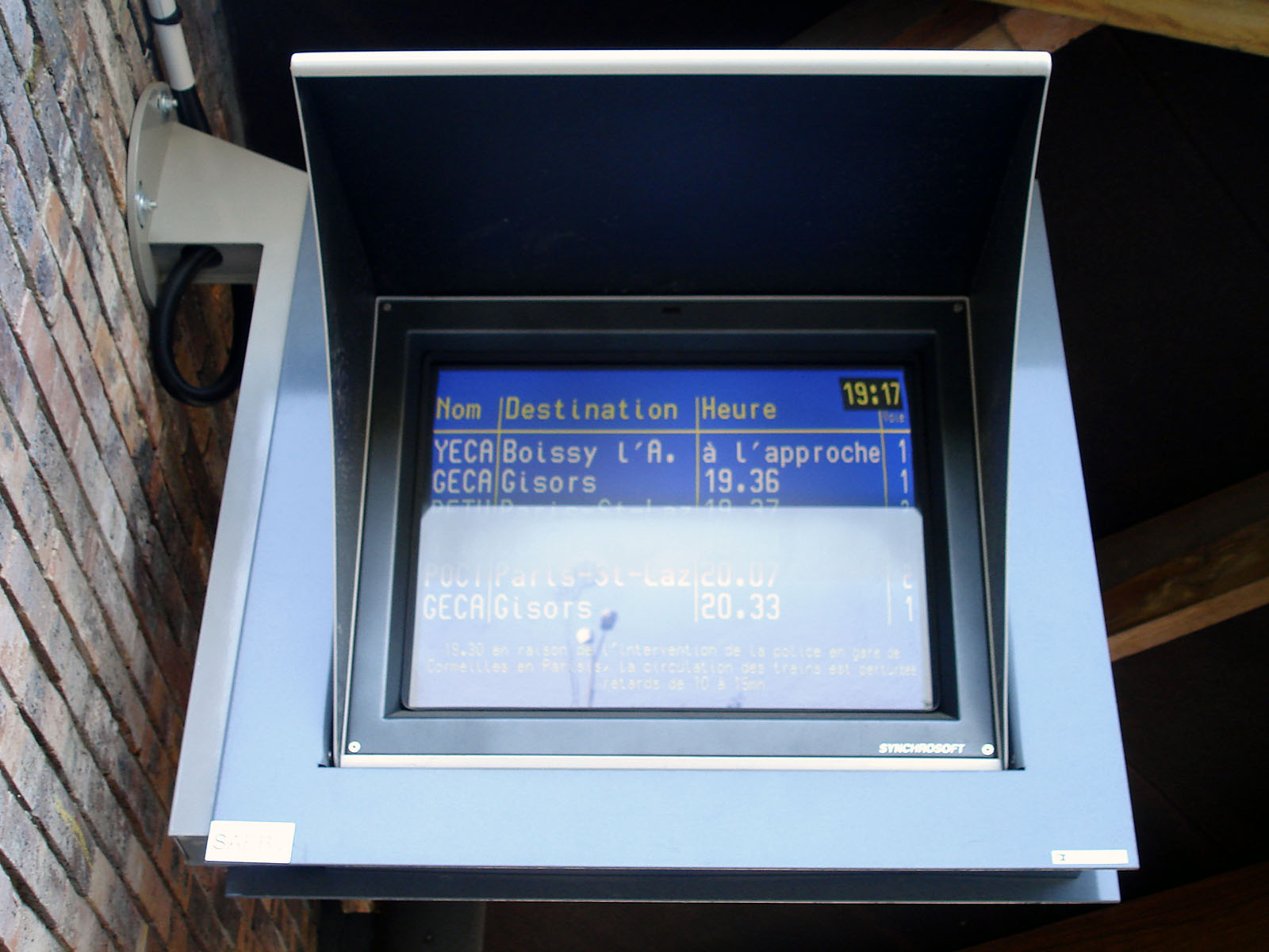 La gare d'Osny, Val-d'Oise, France.